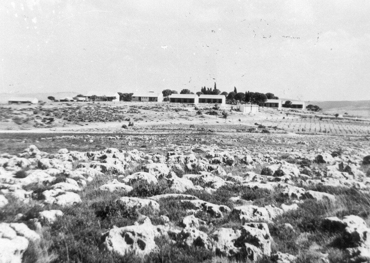 חטיבת הראל - הגדוד החמישי - 1 - אל גוש עציון וממנו - כפר עציון מכיוון "גבעת הסלעים"